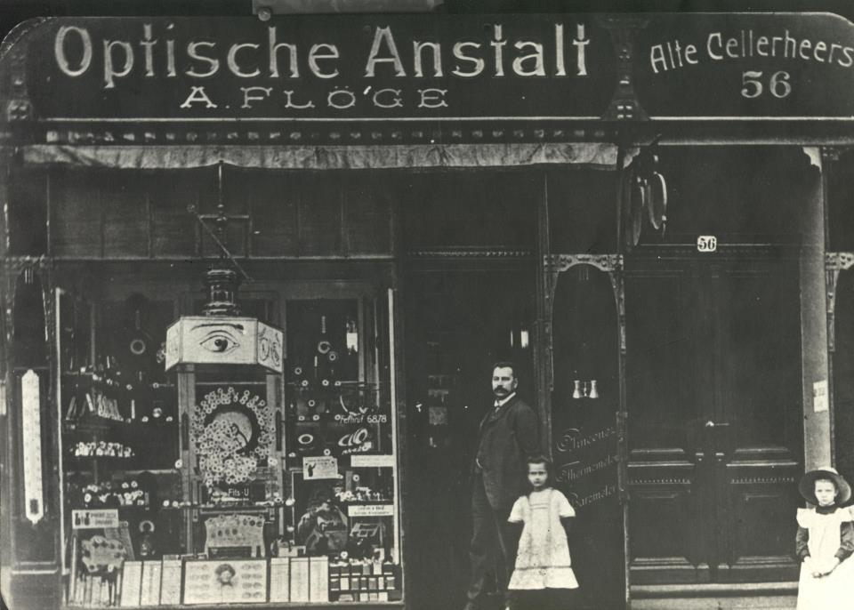 Optische Anstalt A. Flöge